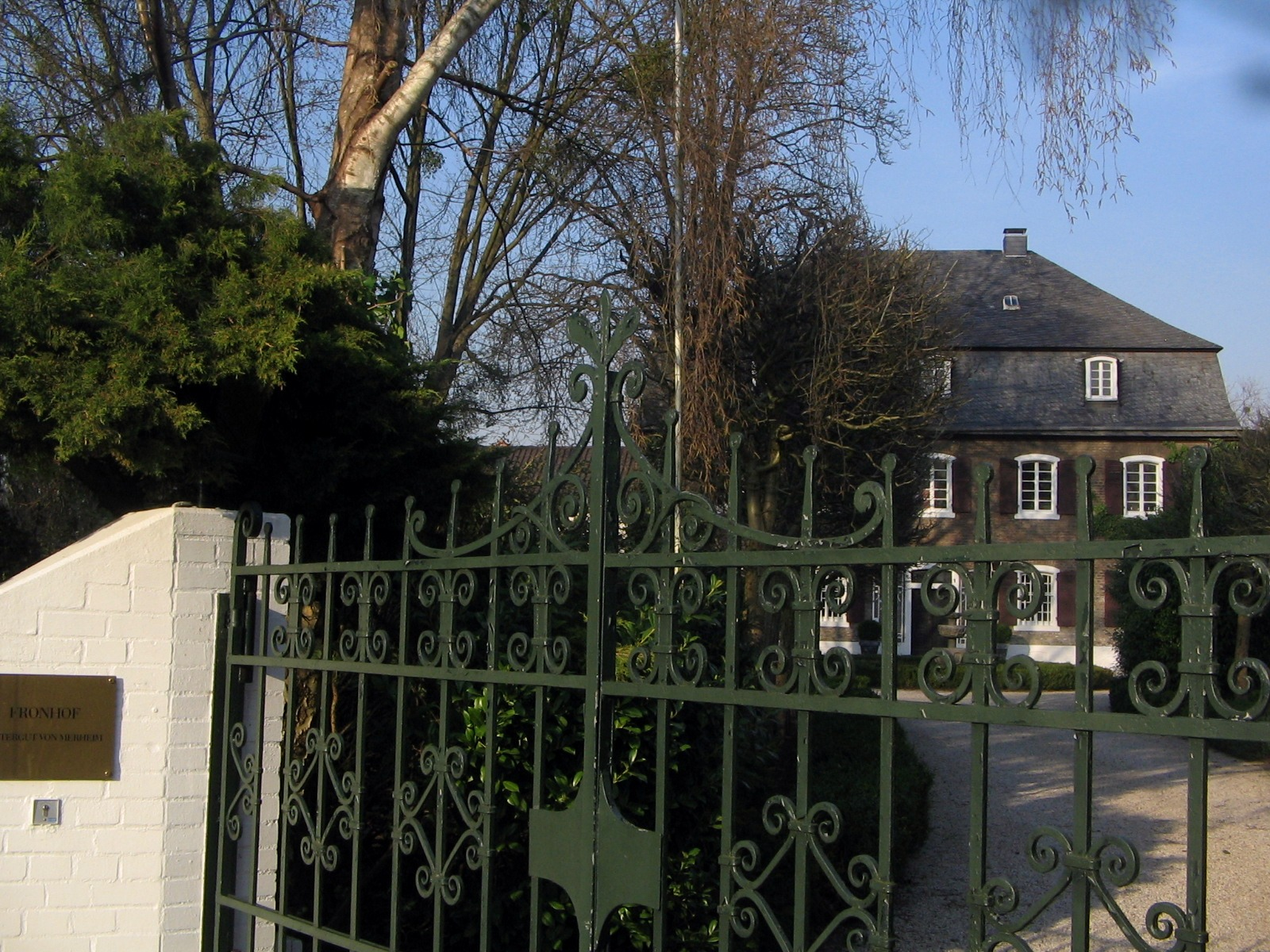 Wunderschön erhaltene Hofanlage des Frohnhofes, nahe St.Gereon.This is a photograph of an architectural monument.